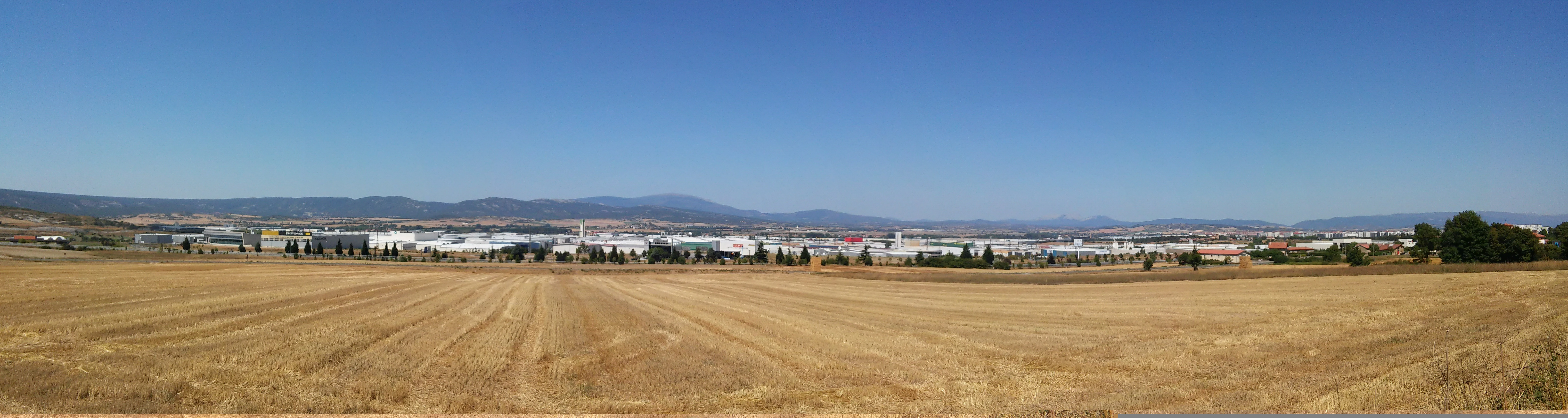 Jundizko industrialdearen ikuspegi orokorra